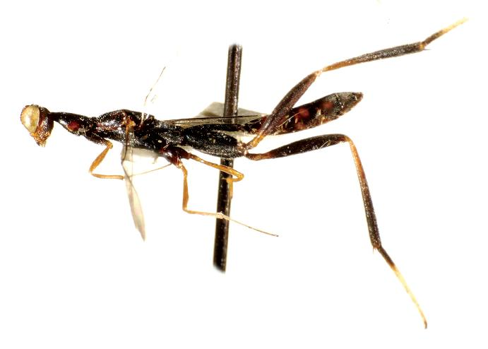 Leptofoenus stephanoides (male)